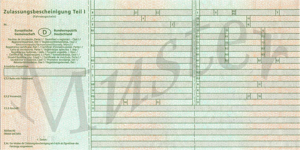 New German/European car registration document form (Zulassungsbescheinigung Teil I, Vorderseite)